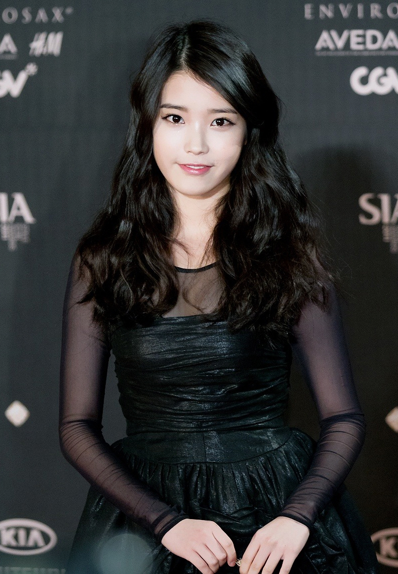 111103-SIA아이유